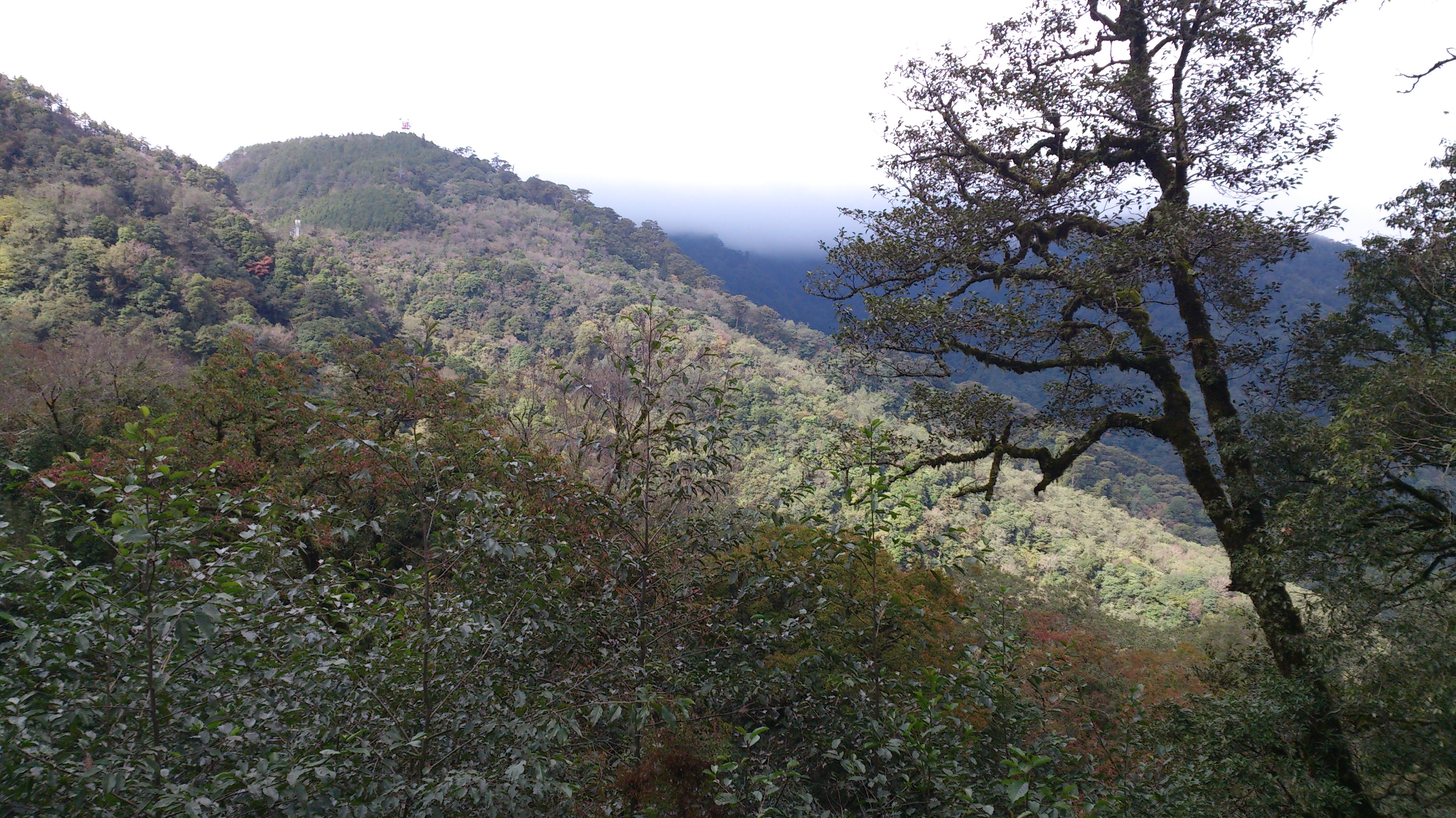 思源啞口 Pyanan Pass